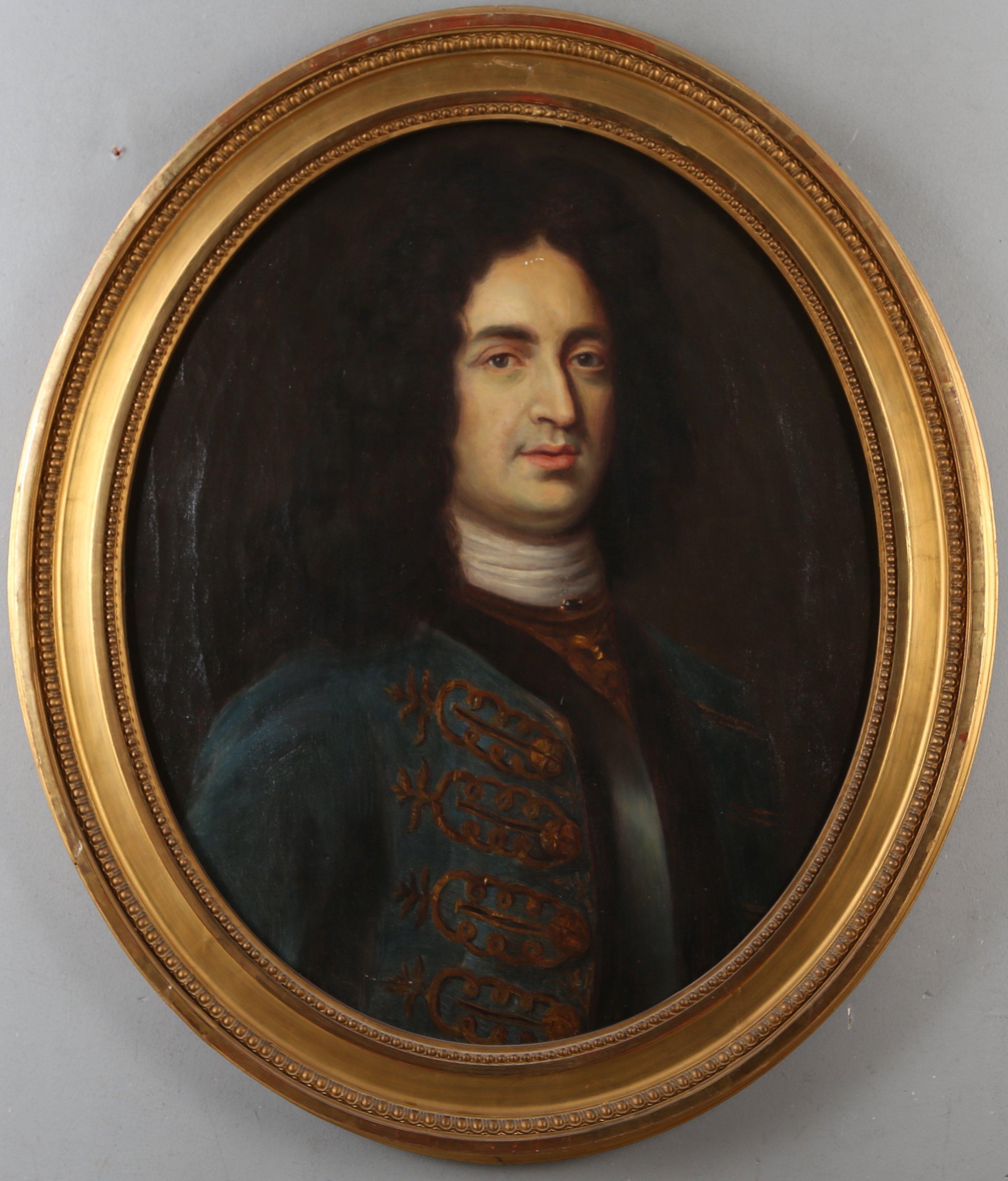 Porträtt av friherre Hugo Hamilton (1655-1724) iklädd uniform med bröstharnesk. Målning av okänd konstnär från ca 1690-1700. Kopia från 1901.